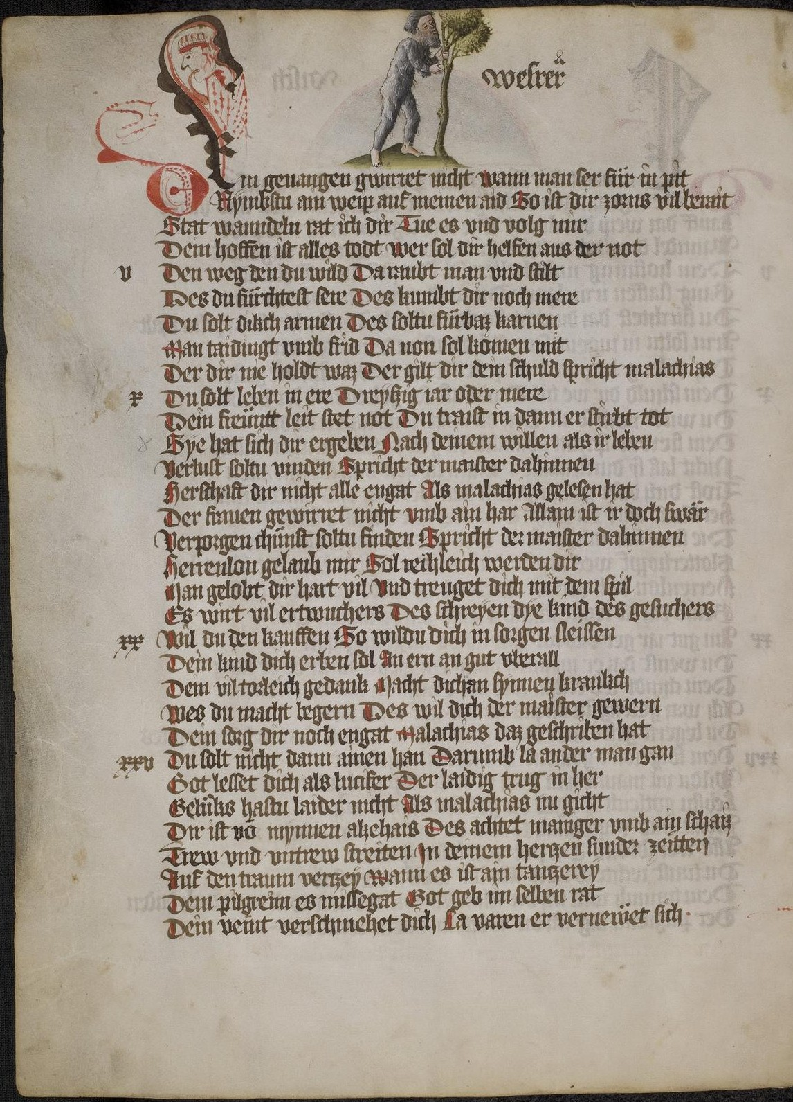 Codex Palatinus germanicus 7, Blatt 13v der Handschrift: Wahrsagebuch, Reimpaarzeilen, über dem Text: Bild Wilder Mann